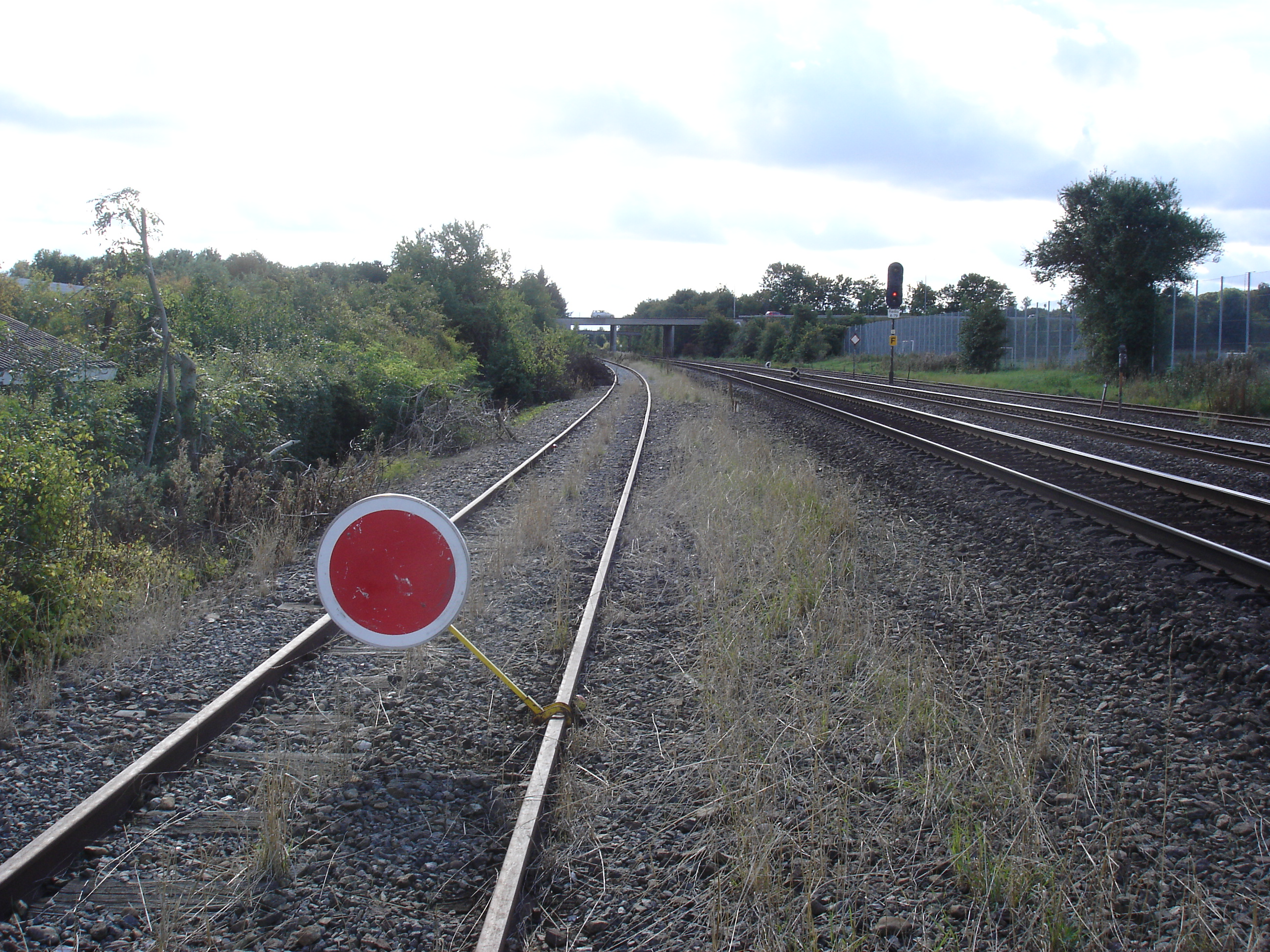 Aalborg Havnebane på Hadsundbanens tracé er siden starten af 2012 midlertidigt lukket ved km 2,0